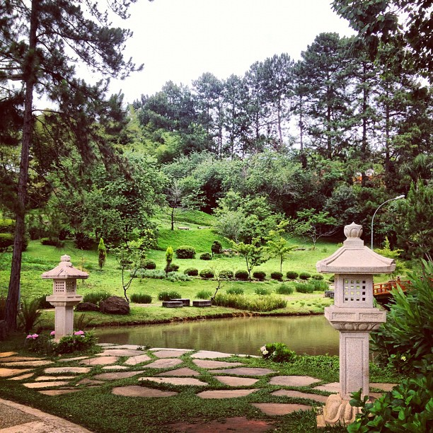 Lago Zu Lai